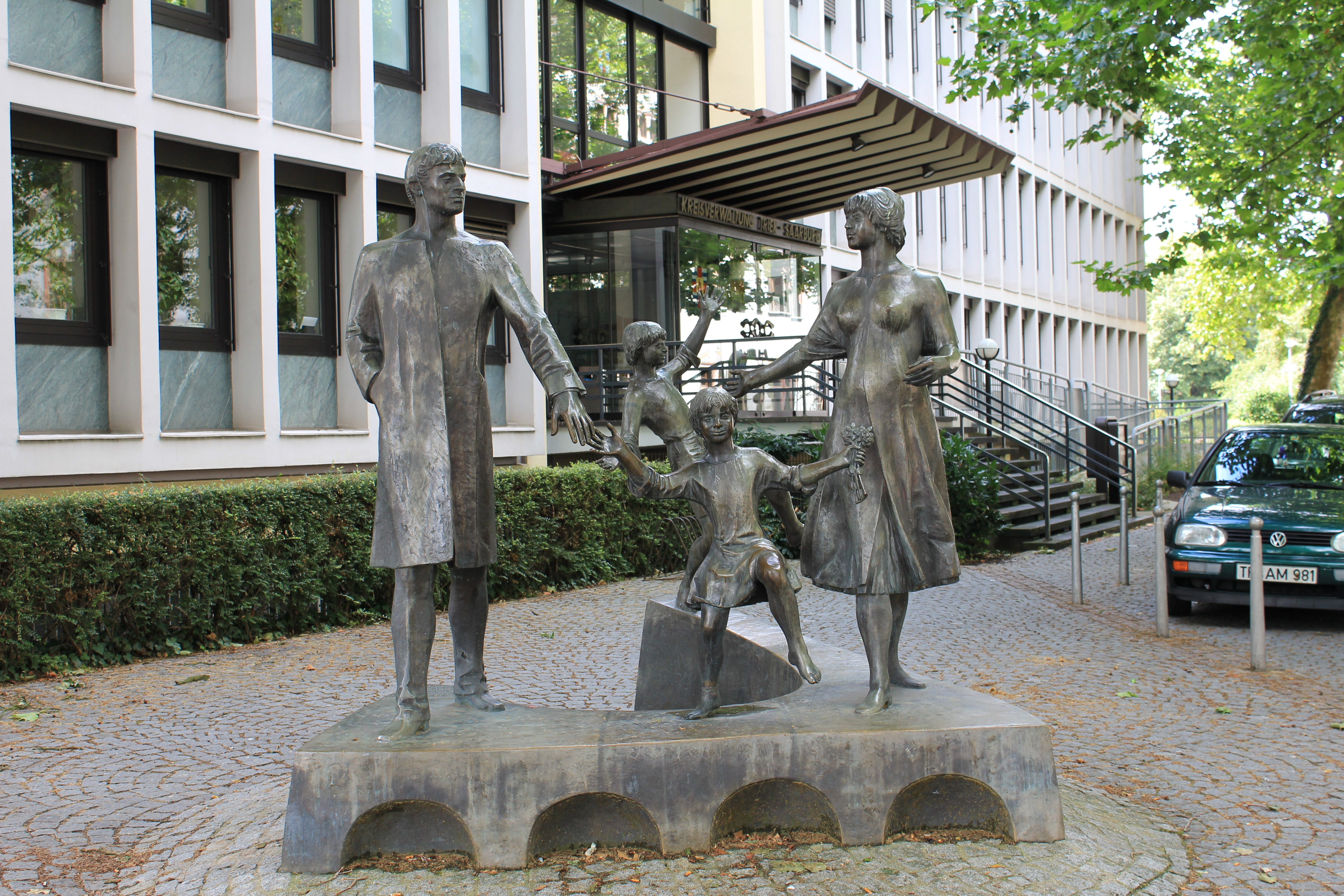 Artwork outside the Kreisverwaltung Trier